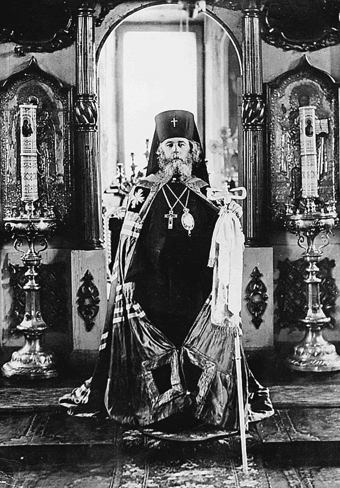 Пётр Георгиевич Холмогорцев (22 июня (4 июля) 1871, Челябинск — 19 октября 1937, Свердловск) — из лидеров Григорианского раскола, григорианский митрополит Свердловский и Челябинский.